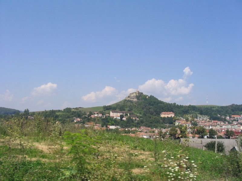 Kőhalom, Erdély, Románia, 2004